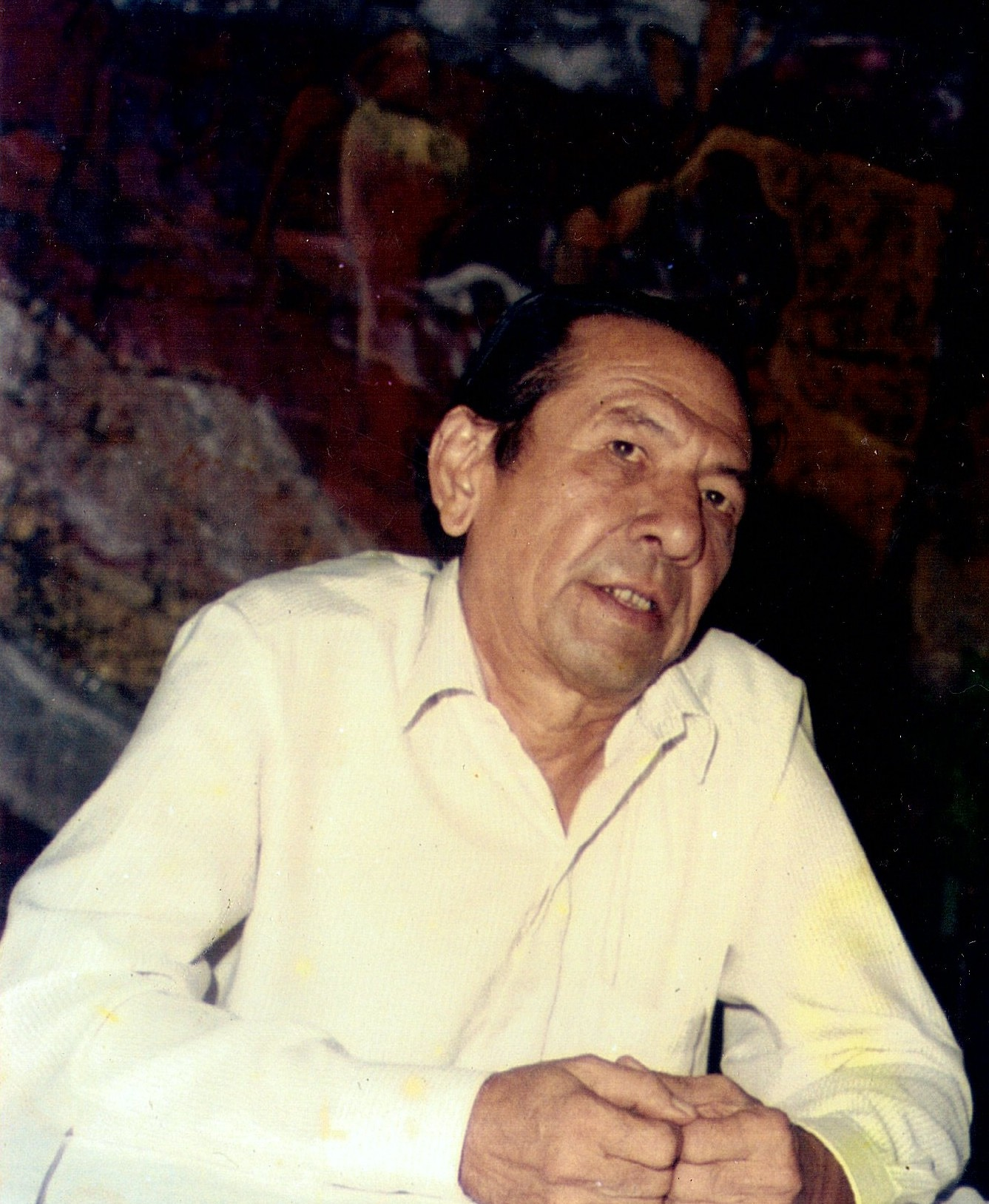 El escritor yaracuyano Rafael Zárraga